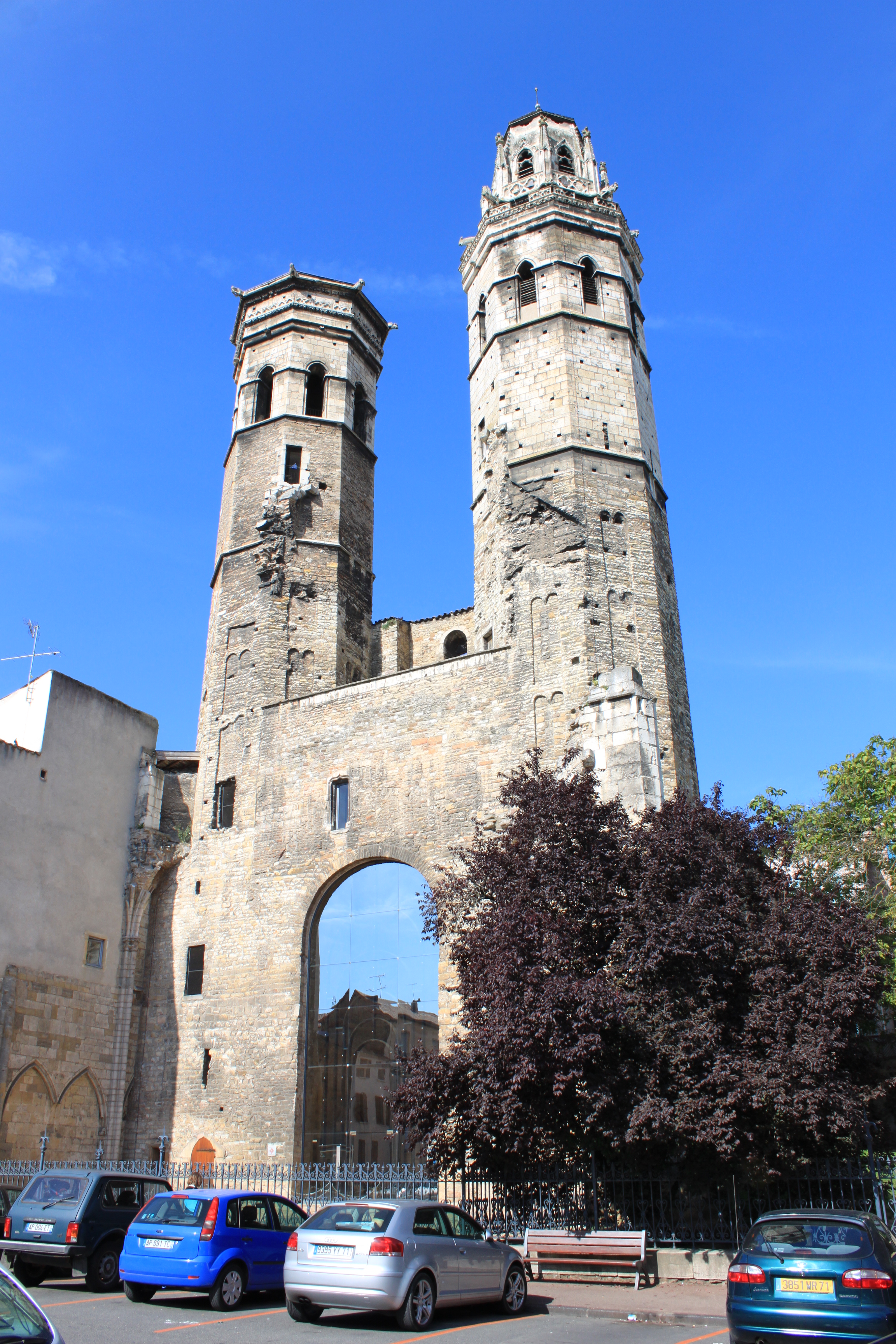 Cathédrale Vieux Saint-Vincent de Mâcon, Mâcon, Saône-et-Loire, Bourgogne, France